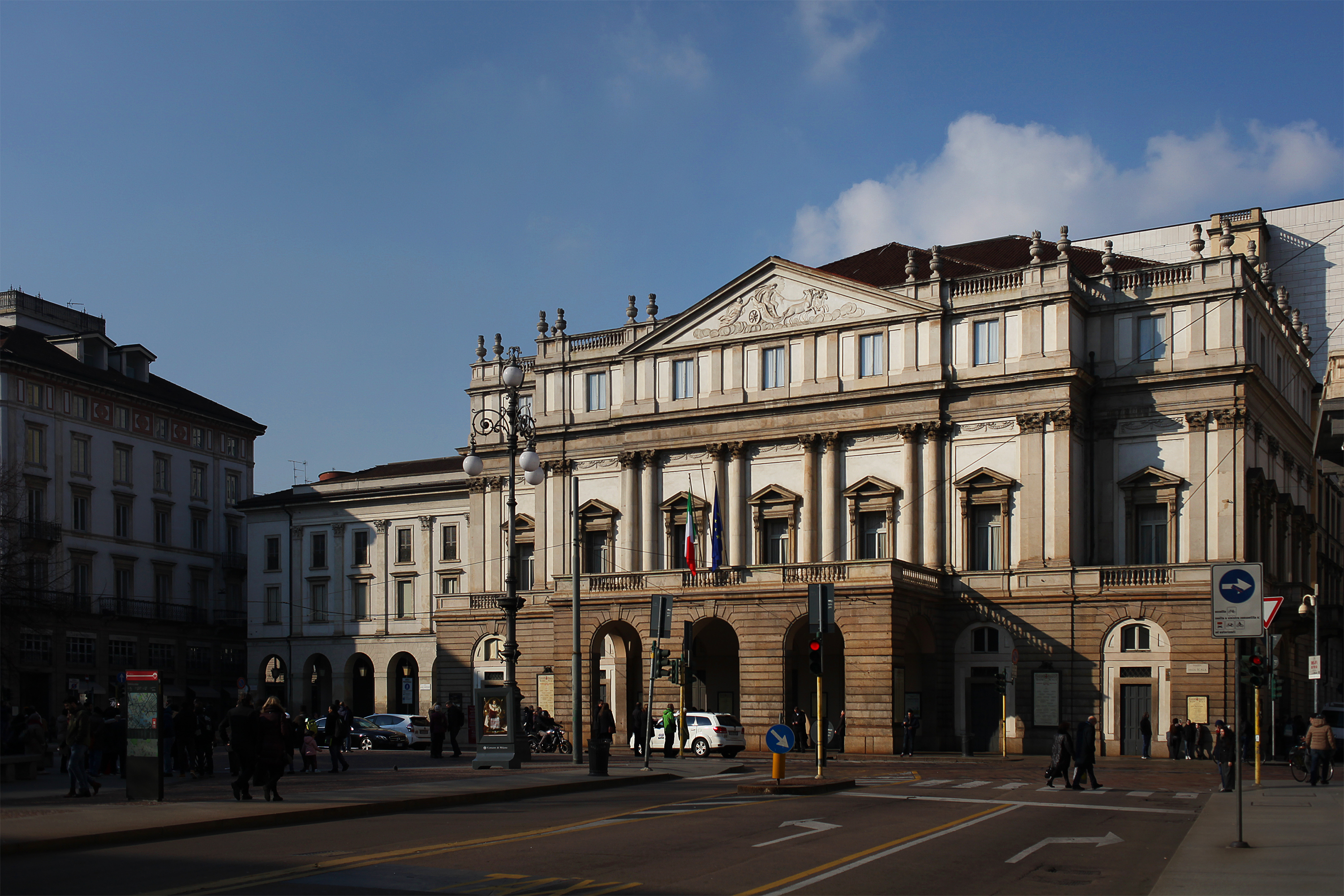 Veduta di tre quarti della facciata del Teatro alla Scala, Milano